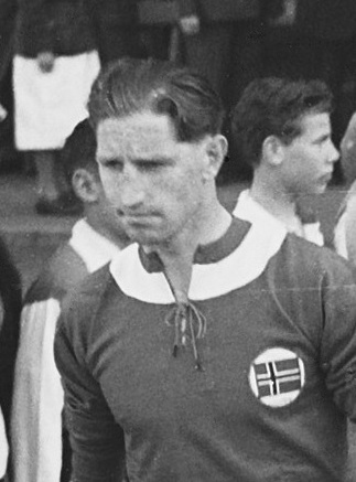 Thorbjørn Svenssen in 1951.